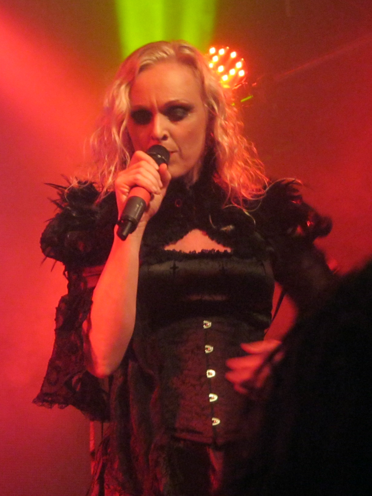 Leaves' Eyes In Israel, 2016